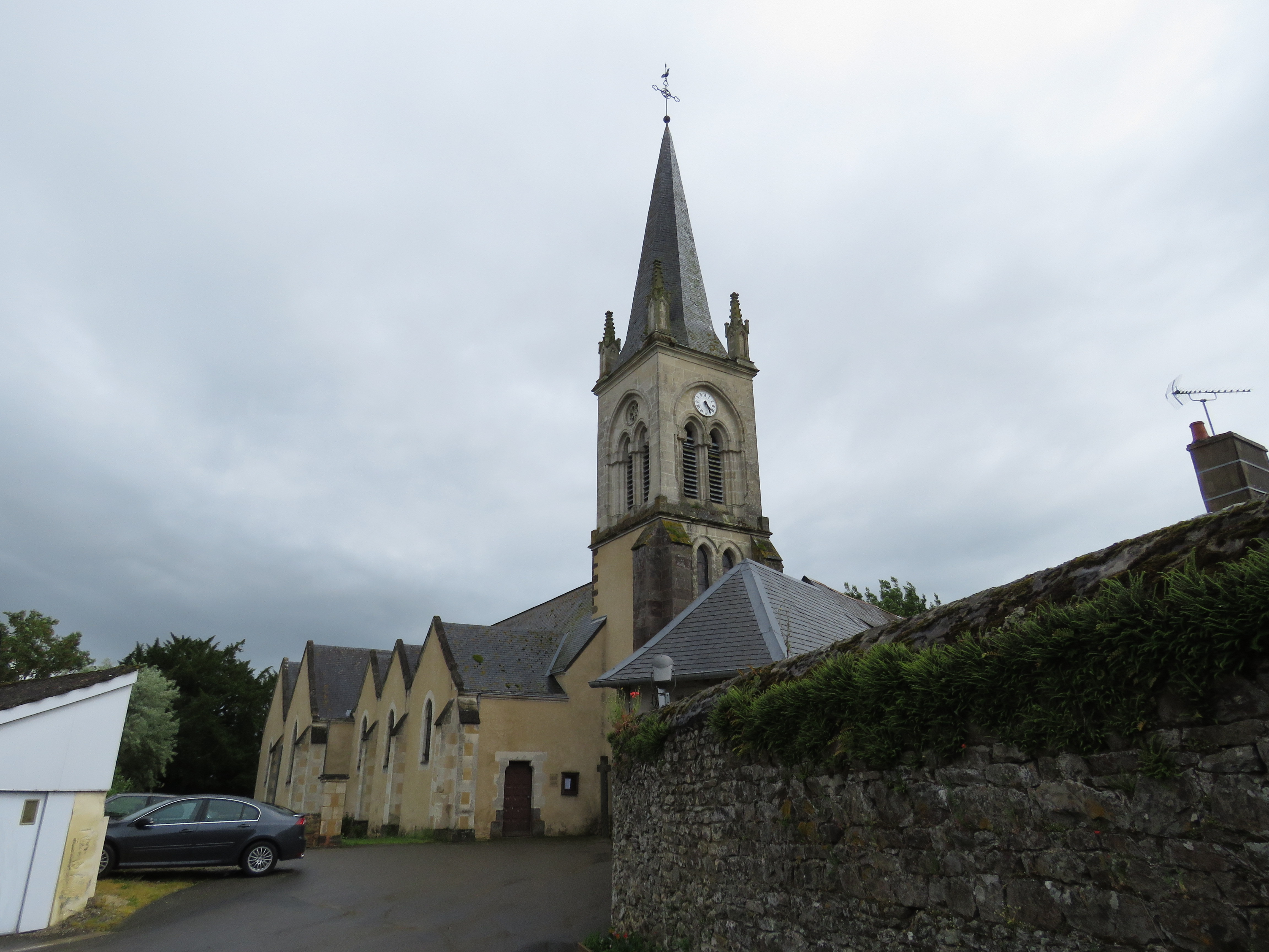 Église